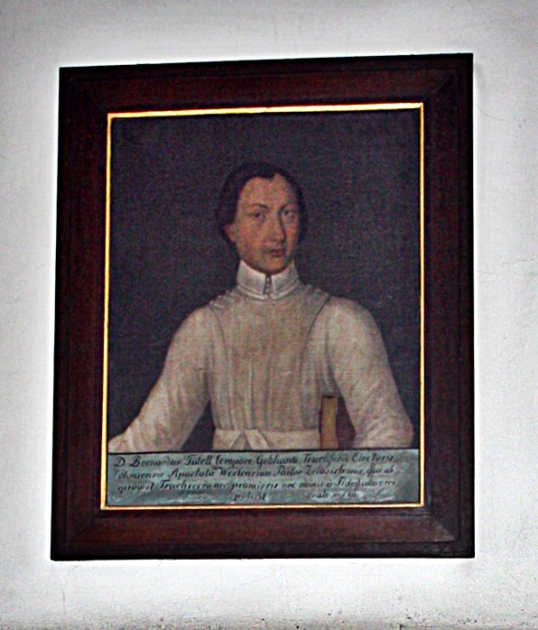 denkmalgeschützte Propsteikirche, Tütelgra, Gemälde mit Darstellung des Bernhard Tütel